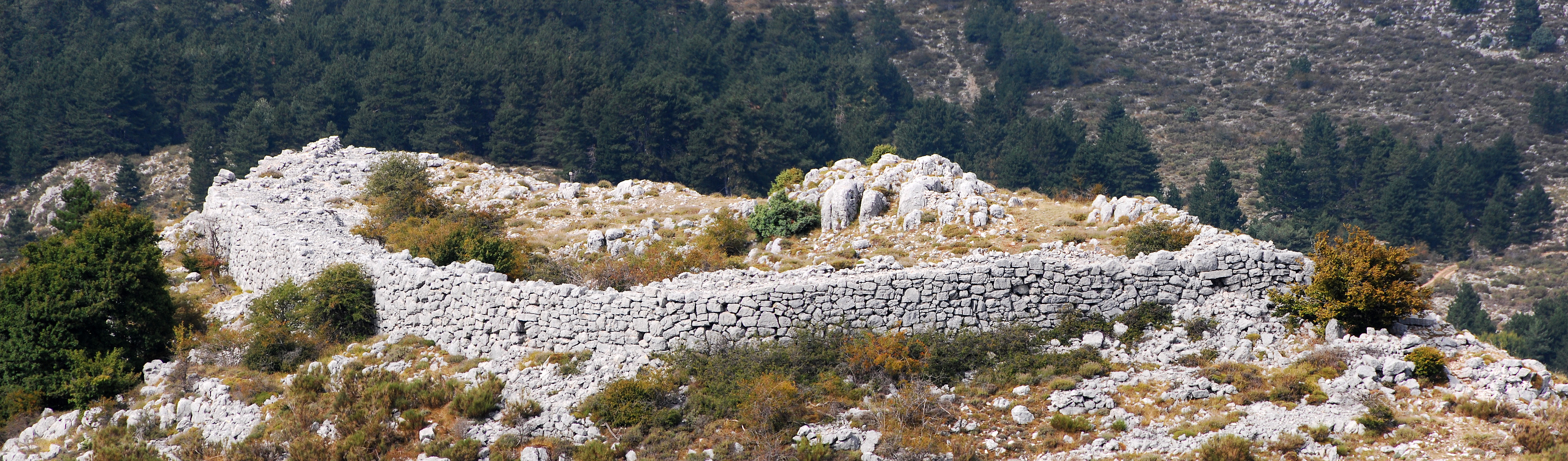 Camp dit Castellaras de la Malle